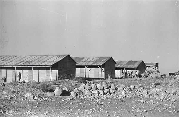 גלאון